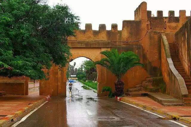 شارع القصبة في تارودانت